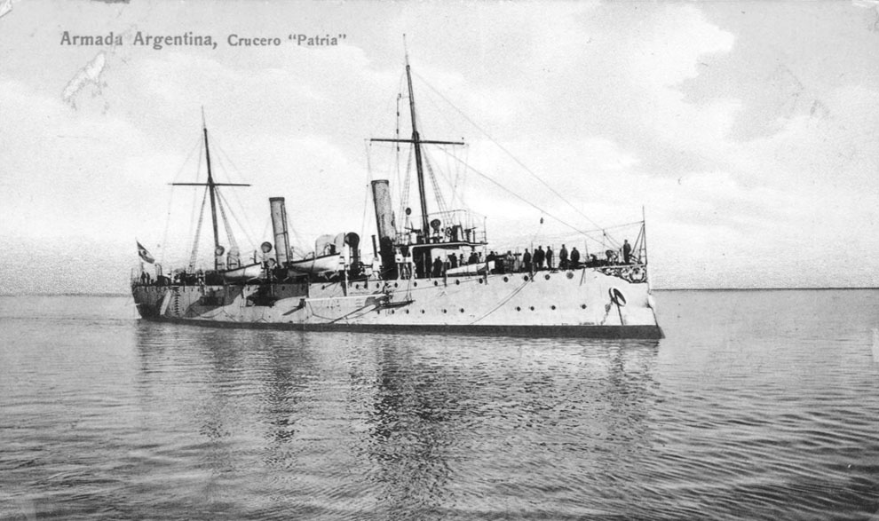 Crucero Patria en 1899